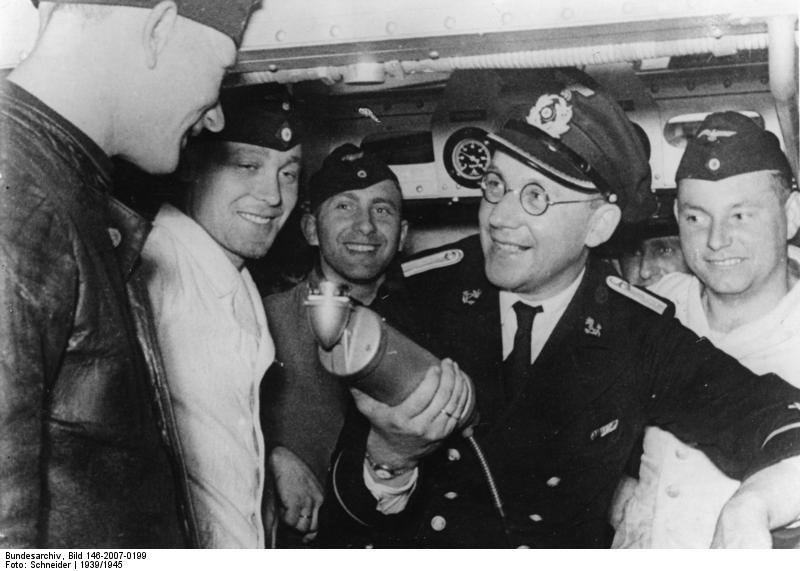 Deutsche Kriegsberichter Der Funkberichter befragt das Maschinenpersonal eines deutschen Schnellbootes sehr eingehend über seine Eindrücke beim Gefecht. PK Schneider/Orbis